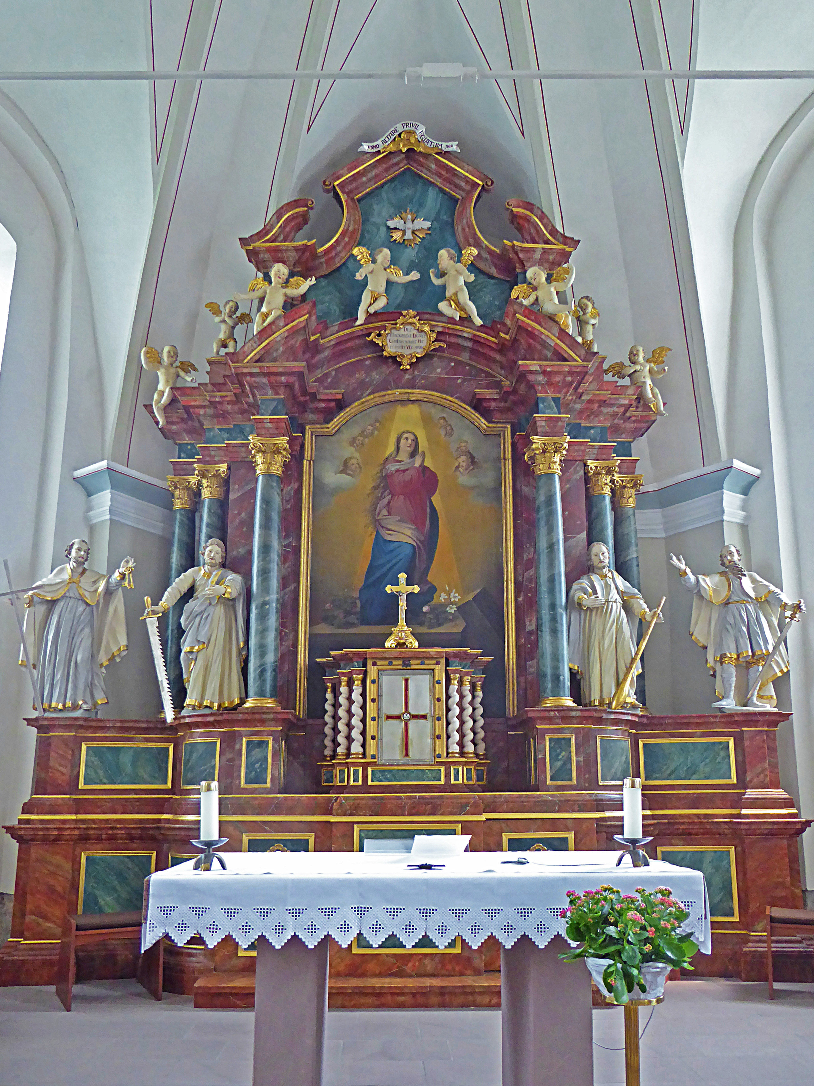 Barockaltar der Kirche St. Simon und Judas in Neustadt (Eichsfeld)